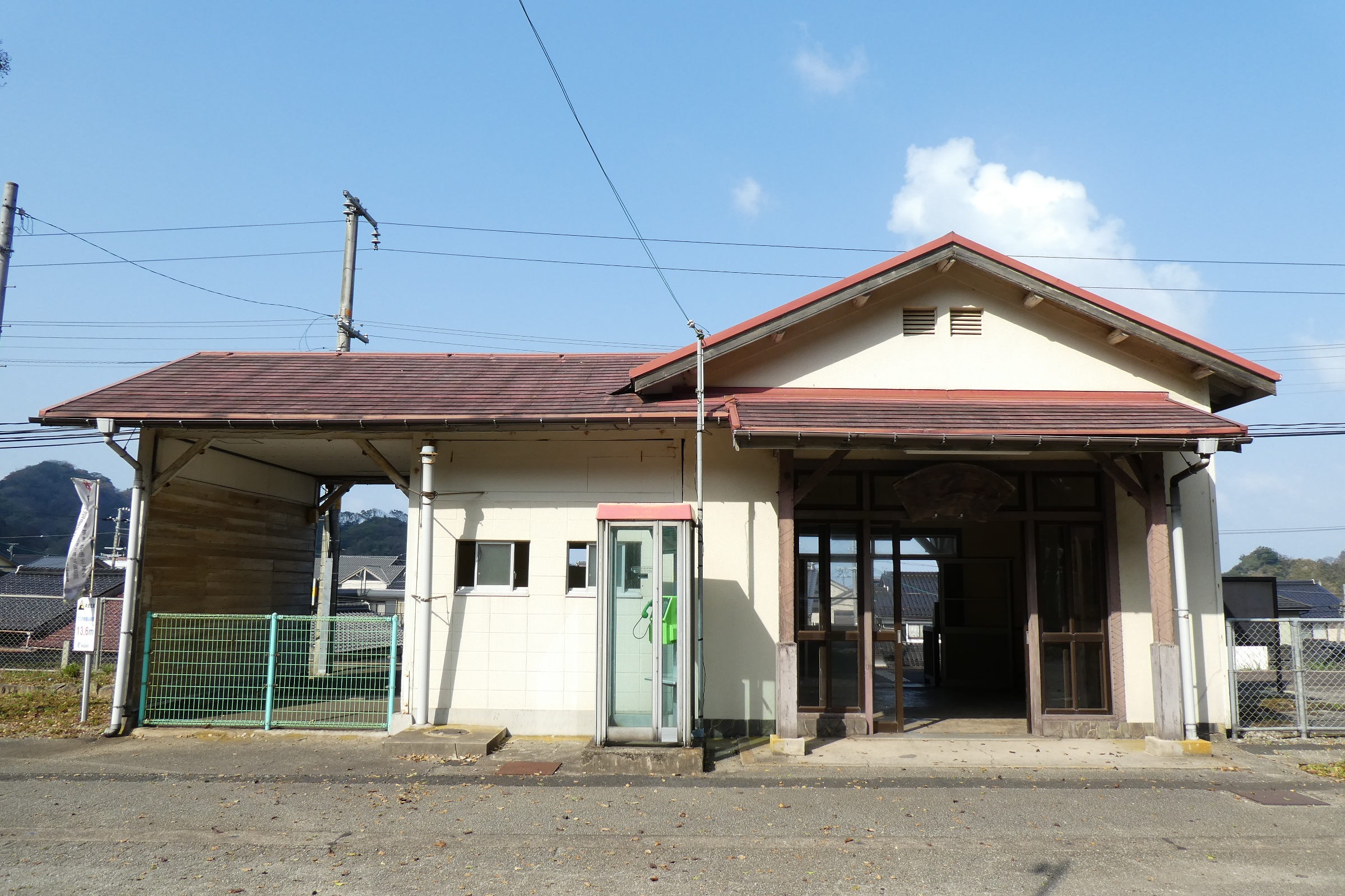 JR山陰本線 諸寄駅。